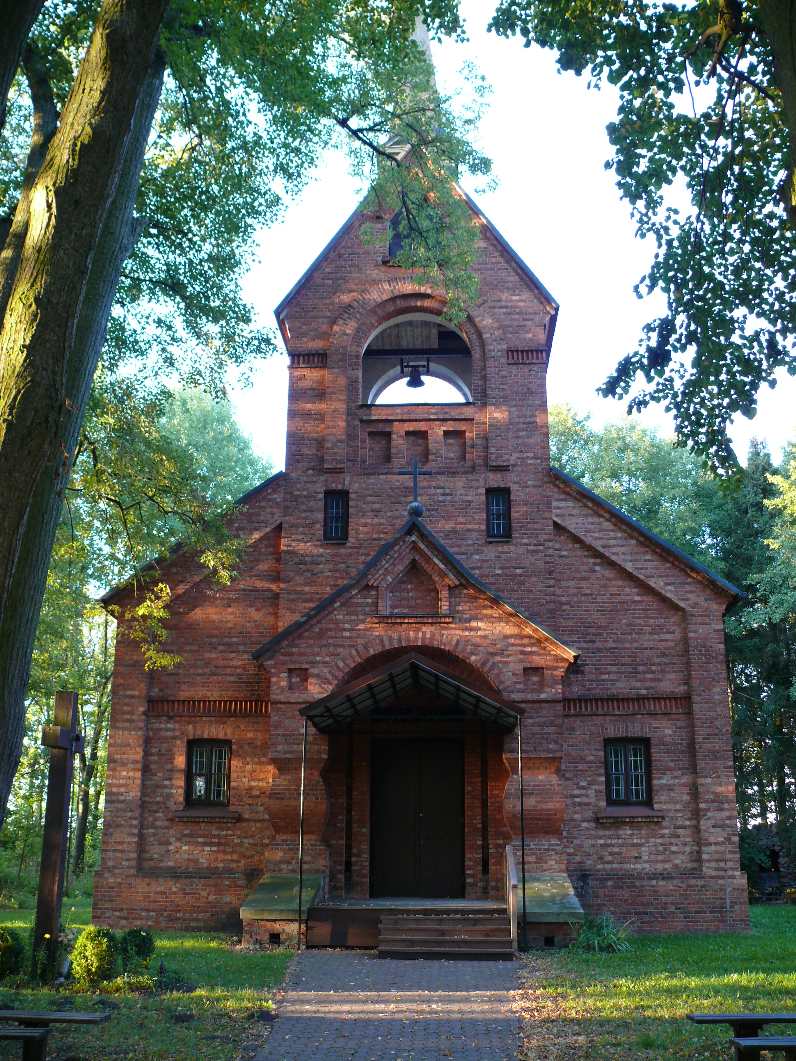 Dawna cerkiew prawosławna, obecnie kościół rzymsko-katolicki pod wezwaniem św. Onufrego (1914r.) w miejscowości Horodek, gmina Drelów, powiat bialski, woj. lubelskie. Widok od frontu. (Zabytek nr.A-268 z 20.08.1997)